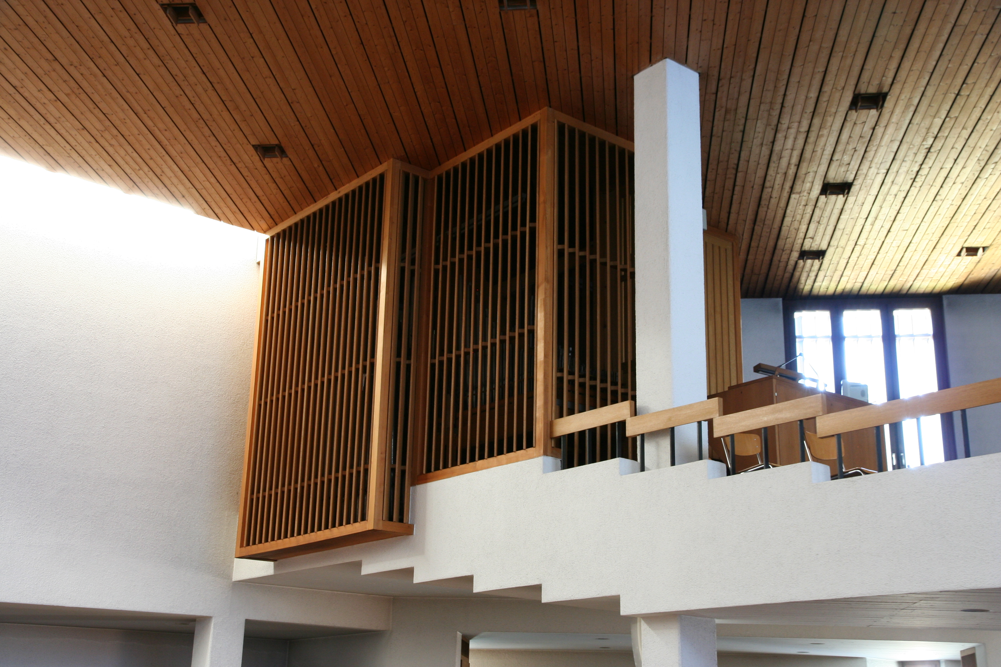 Römisch-katholische Pfarrkirche St. Felix und Regula Wattwil